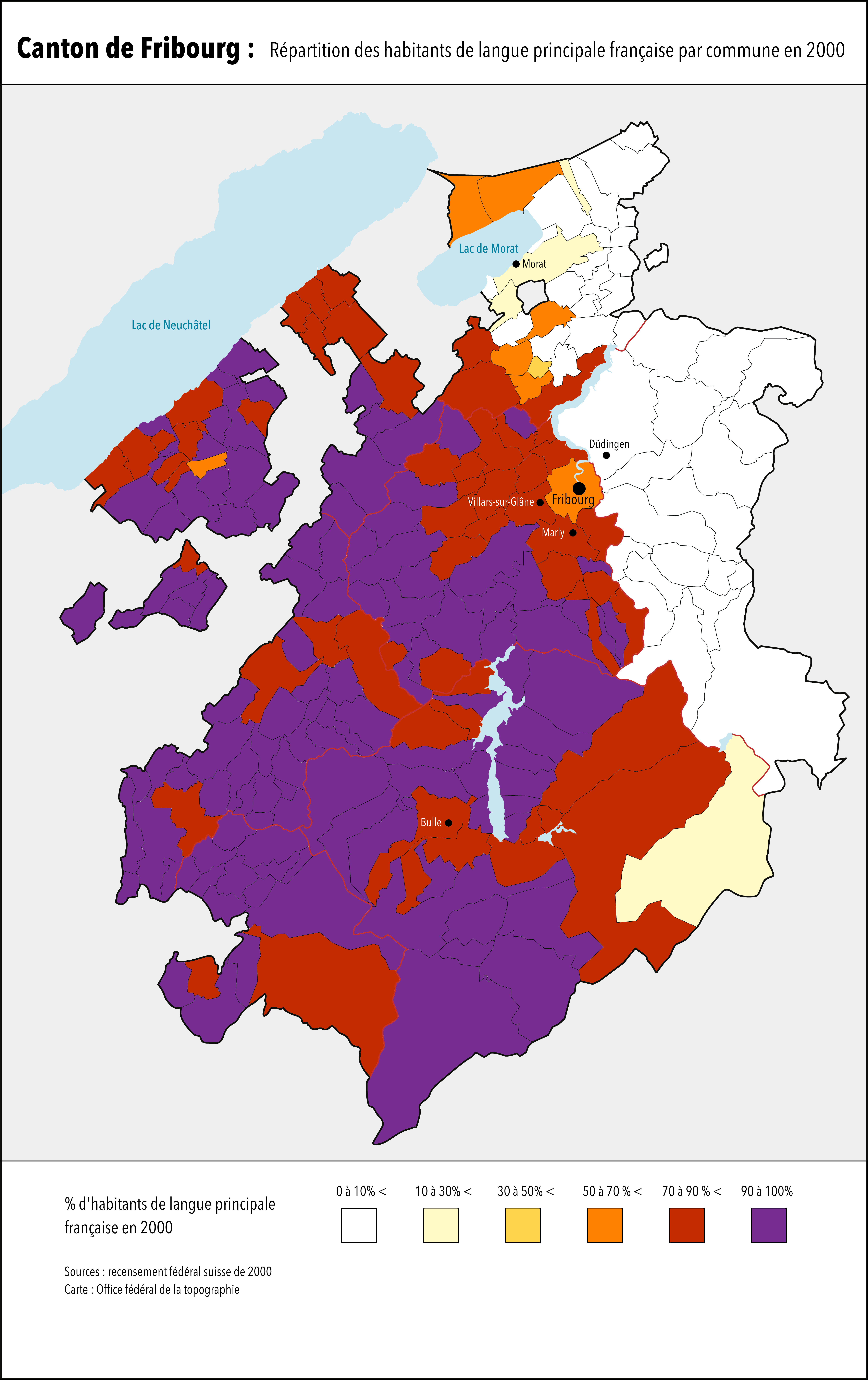 Répartition des habitants ayant le français comme langue principale par commune lors du recensement de 2000